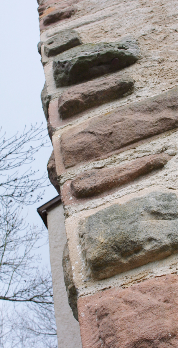 Le bossage est une saillie sur la pierre du château de Hartmannswiller.